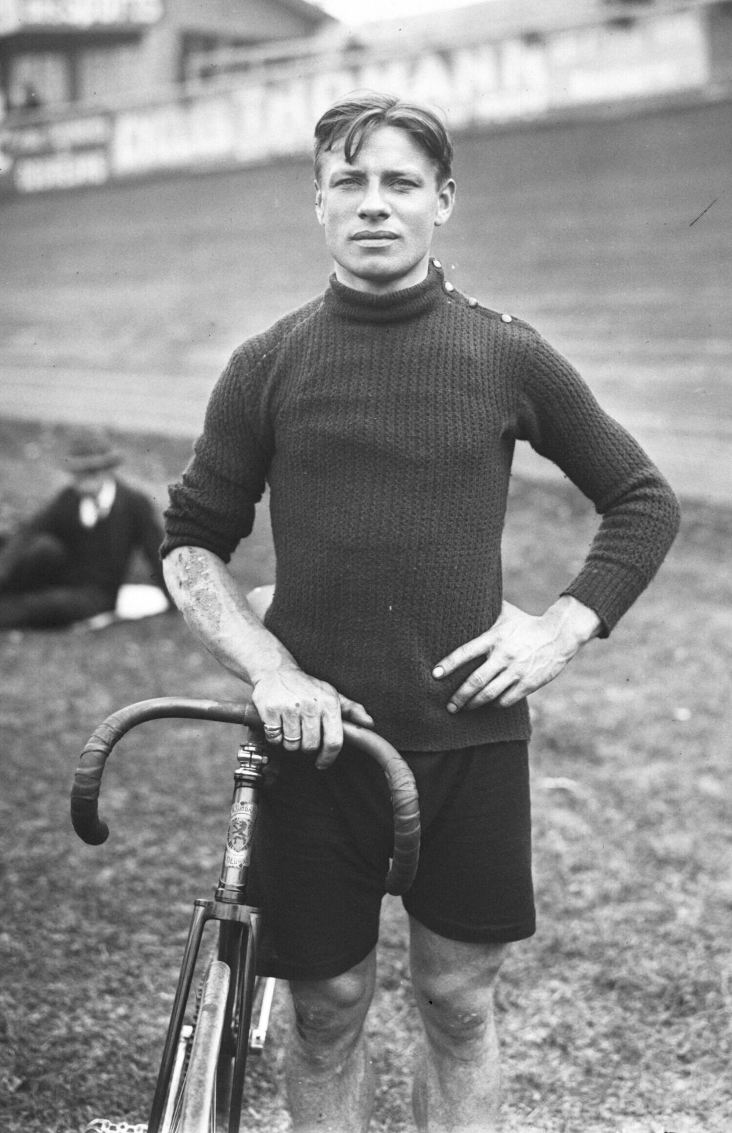 A. Vanderstuyft [portrait du coureur cycliste à côté de son vélo] : [photographie de presse] / [Agence Rol]